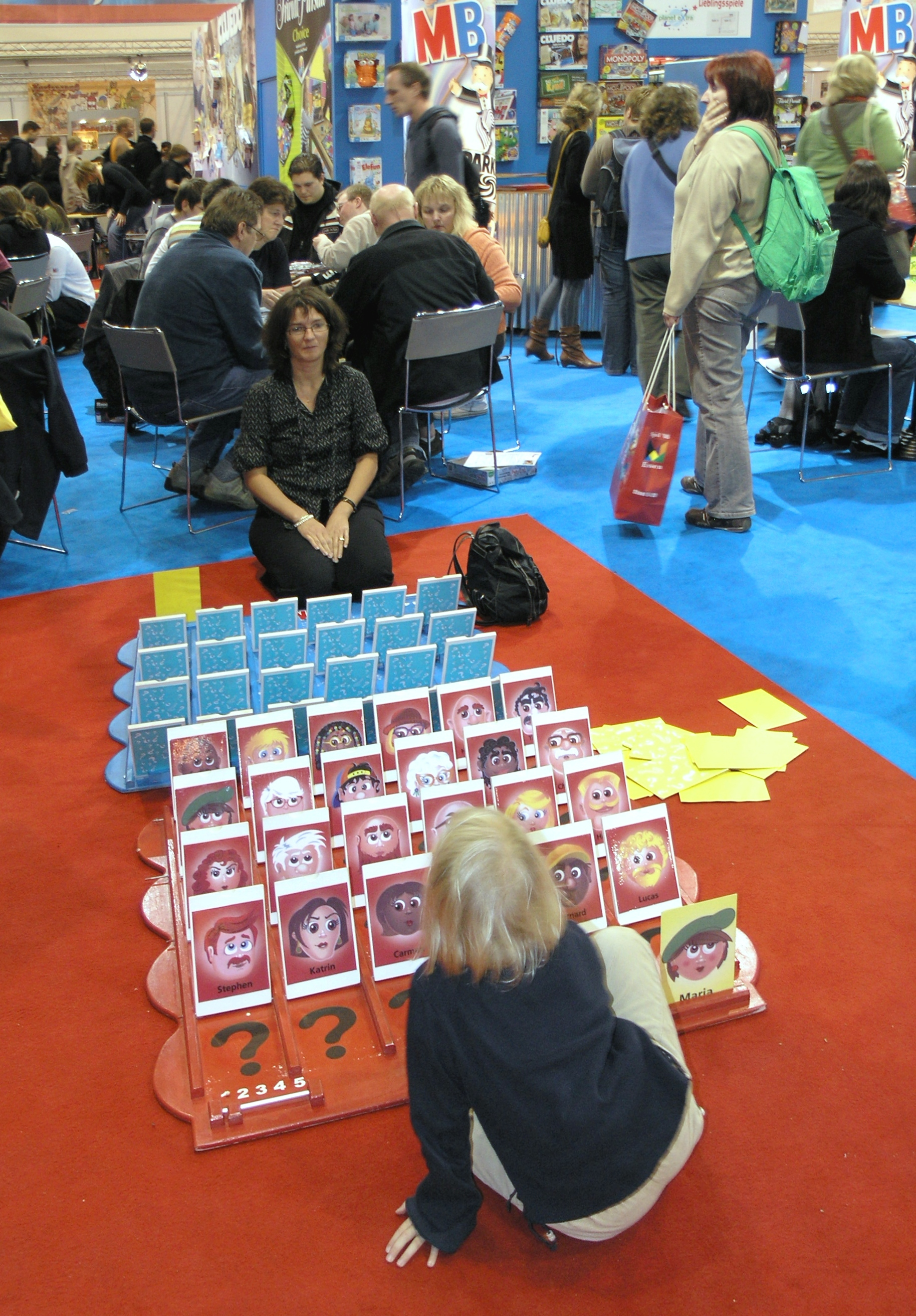 Internationalen Spieltage SPIEL 2008